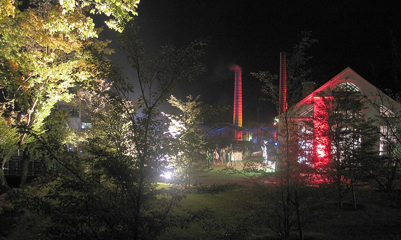 Autor: Ralf Roletschek Marcela GNU-FDL (selbst aufgenommen)